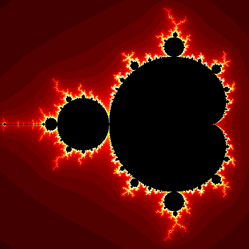 conjunto de Mandelbrot, creado por Romero Schmidtke